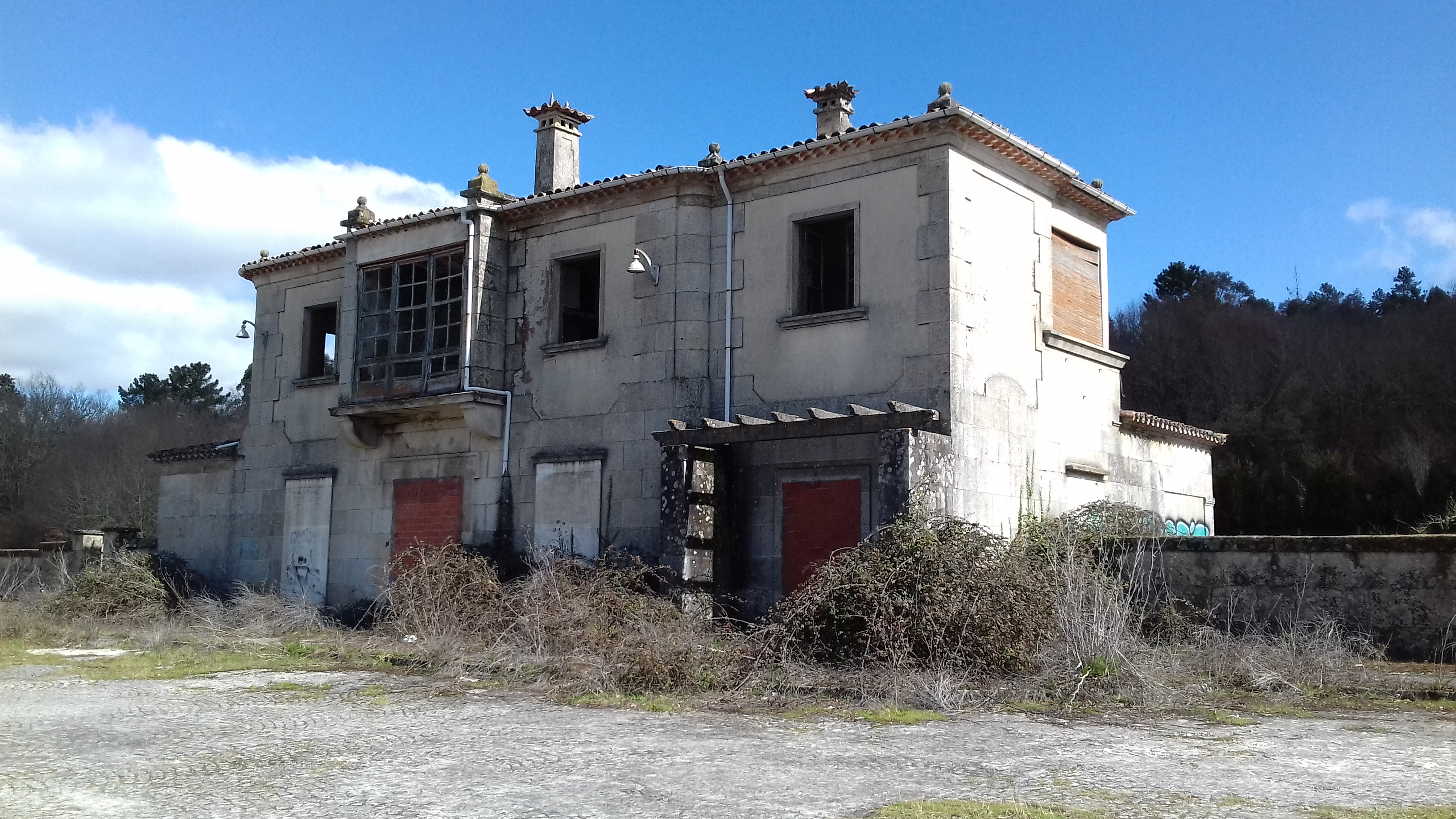 Estación de Boborás